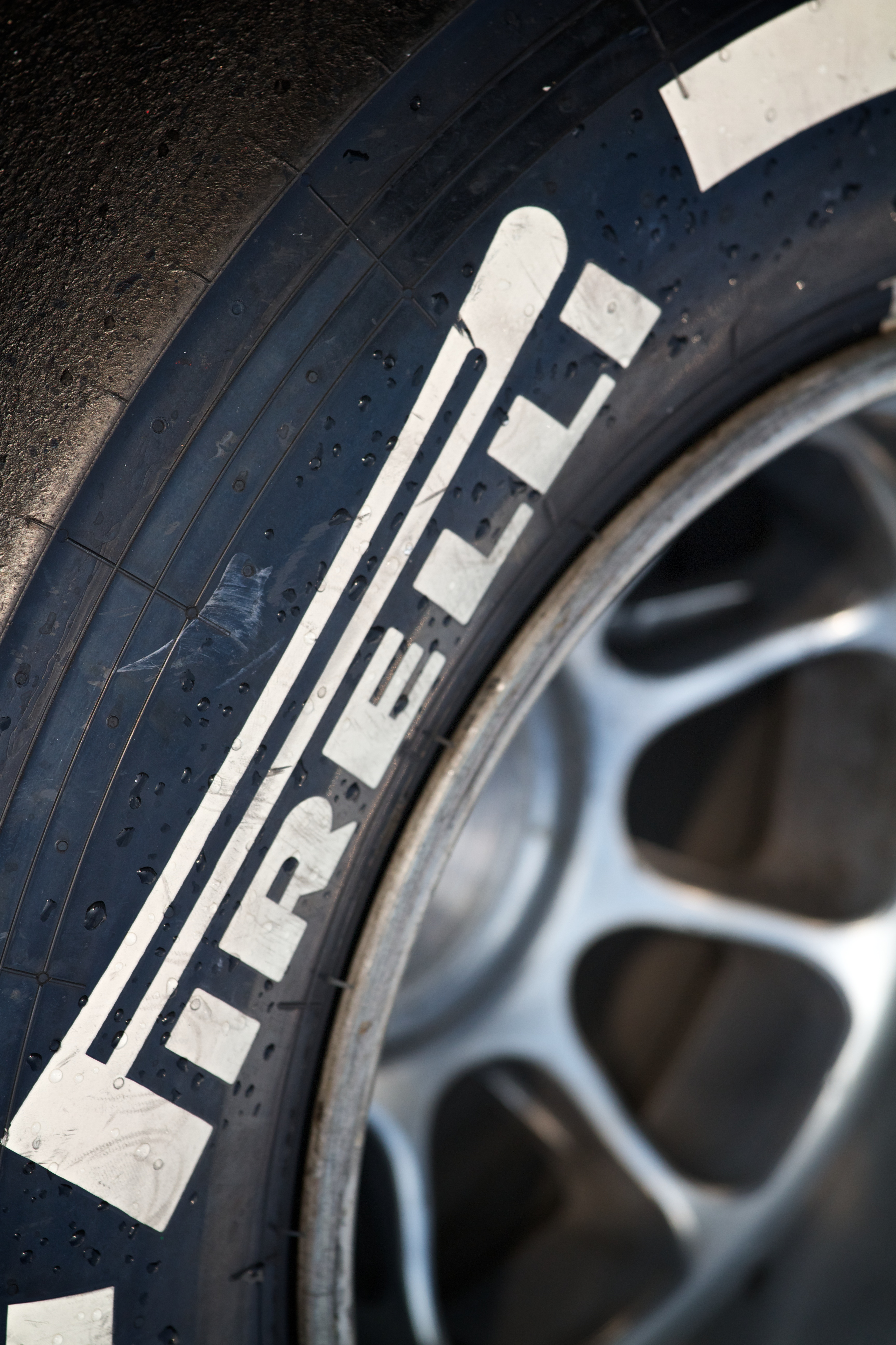 Pirelli Hard Tyre 2012